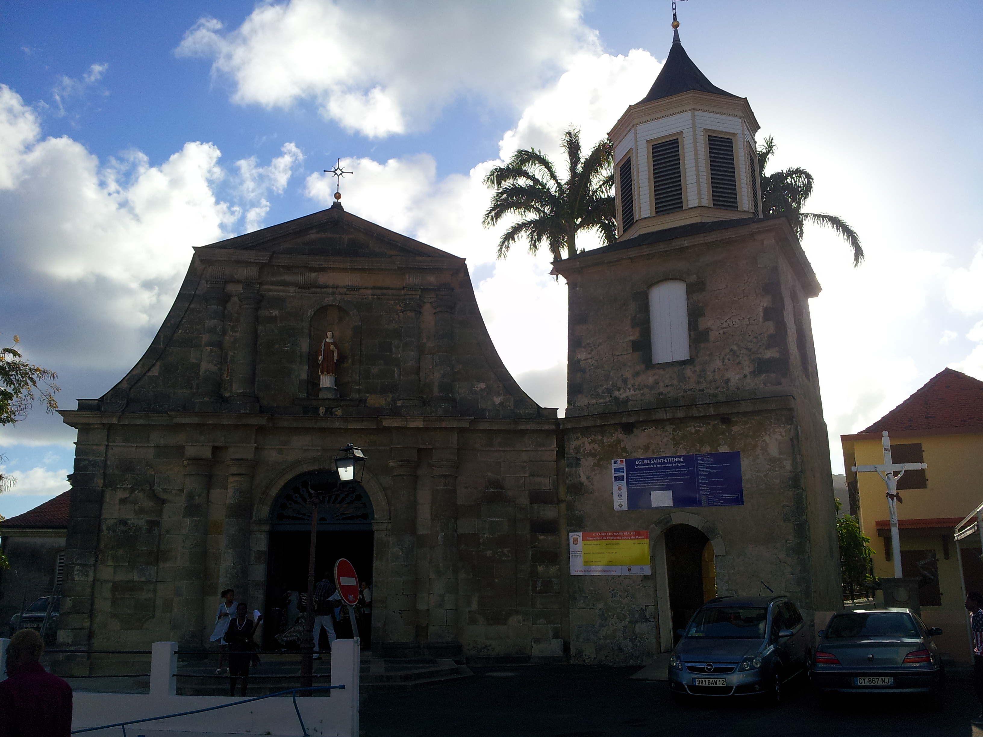 Façade de l'église Saint-Étienne du Marin